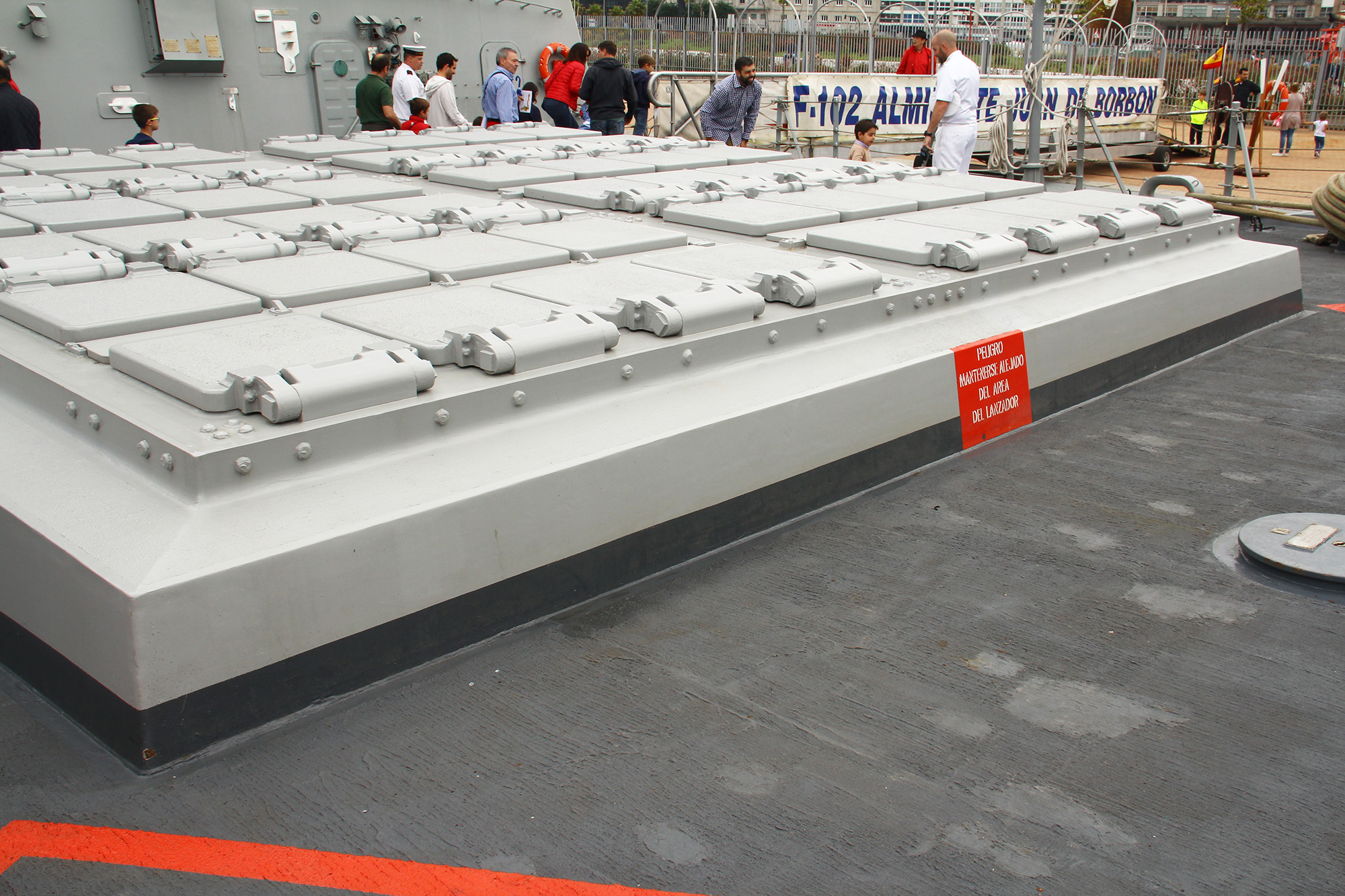 Visita a Vigo de las fragatas "Álvaro de Bazán" F-101 y "Almirante Juan de Borbón" F-102 de la Armada Española, ambas de la clase "Álvaro de Bazán" (también conocida como F-100), el 27 y 28 de mayo de 2017. Frigates F-100 in Vigo Visit to Vigo of the frigates "Álvaro de Bazán" F-101 and "Admirante Juan de Borbón" F-102 of the Spanish Navy, both of the class "Álvaro de Bazán" (also known as F-100), May 27 and 28, 2017.